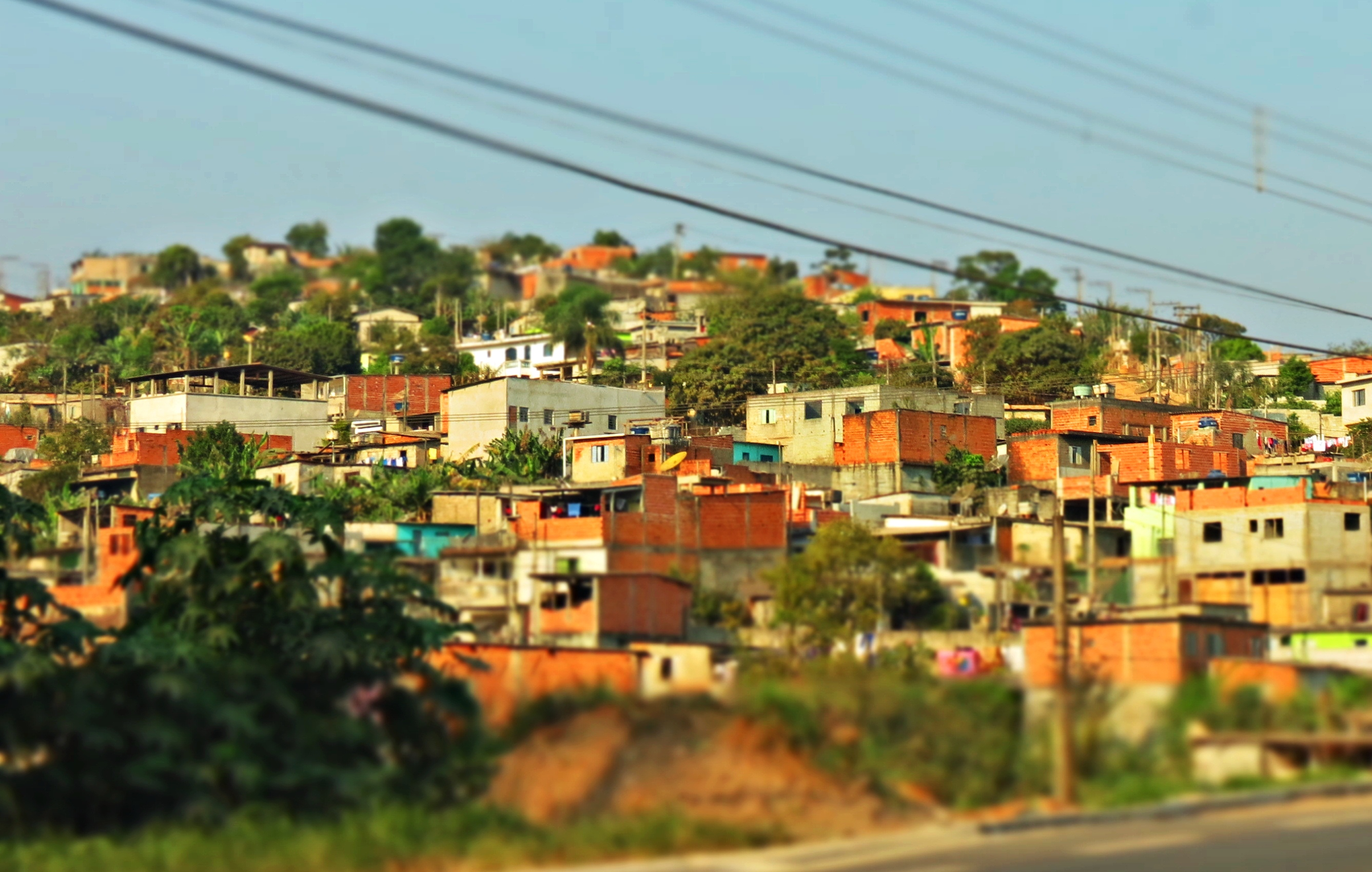 Parque Vitória, um dos bairros mais carentes e mal estruturados da cidade